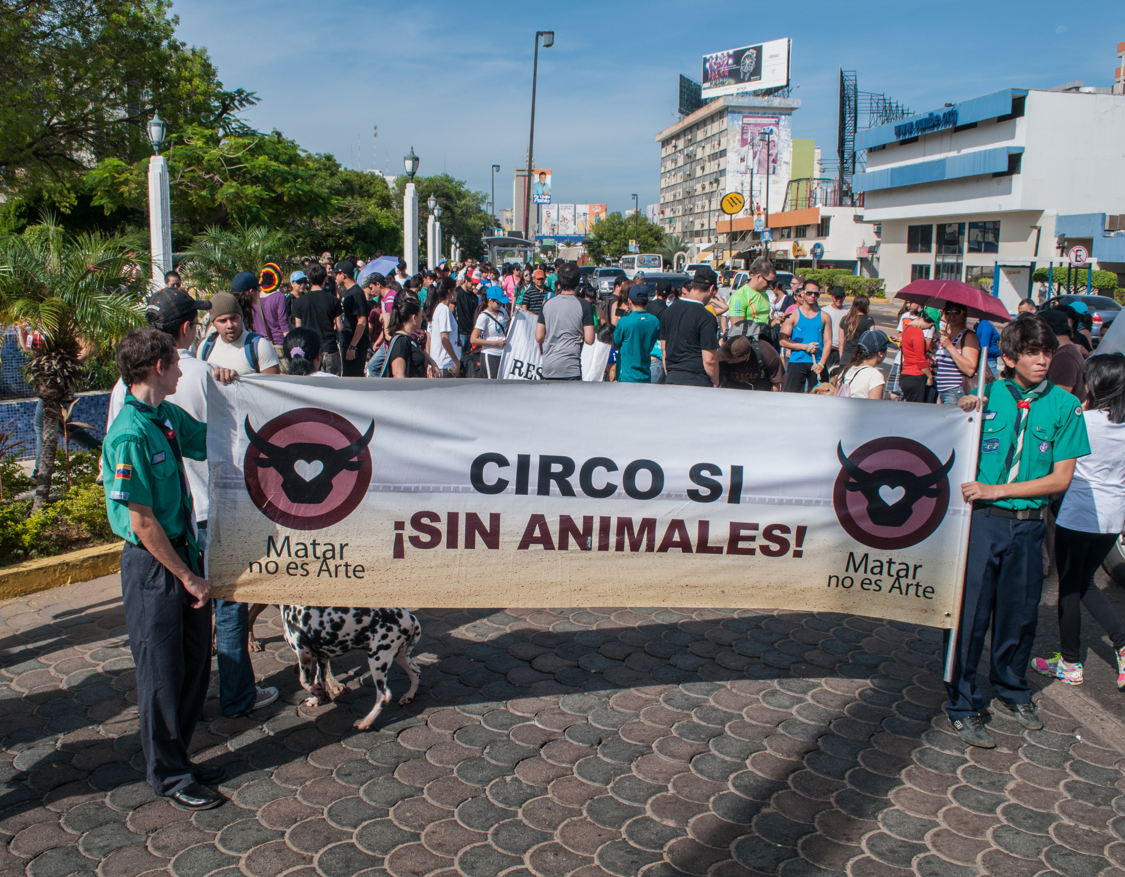 Caminata anual en favor de los animales celebrada en Maracaibo anualmente, en este caso el 3 de Noviembre de 2012